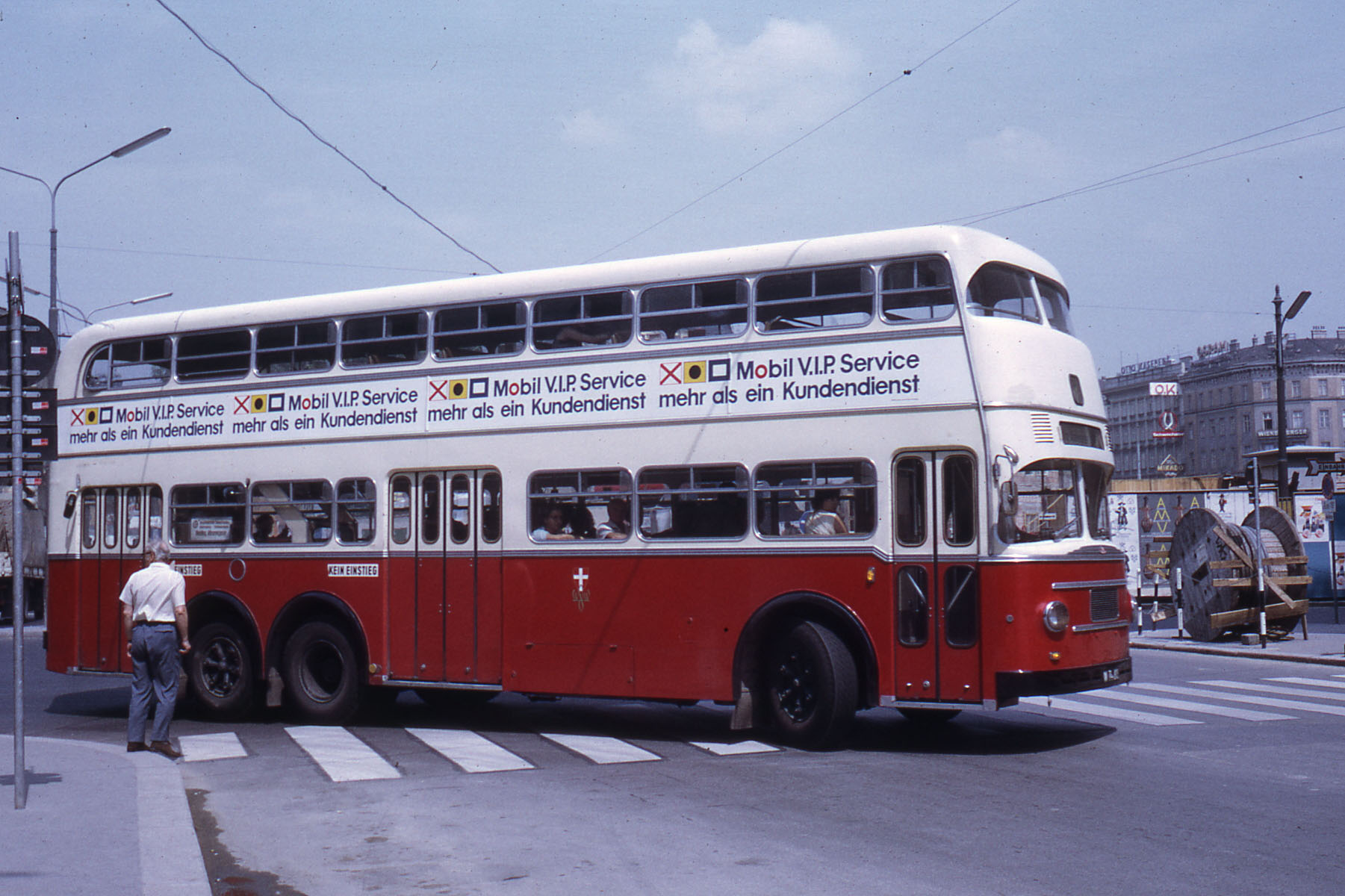 Doppeldecker ÖAF Gräf & Stift DD 2 FU. Linie 61 am Karlsplatz.